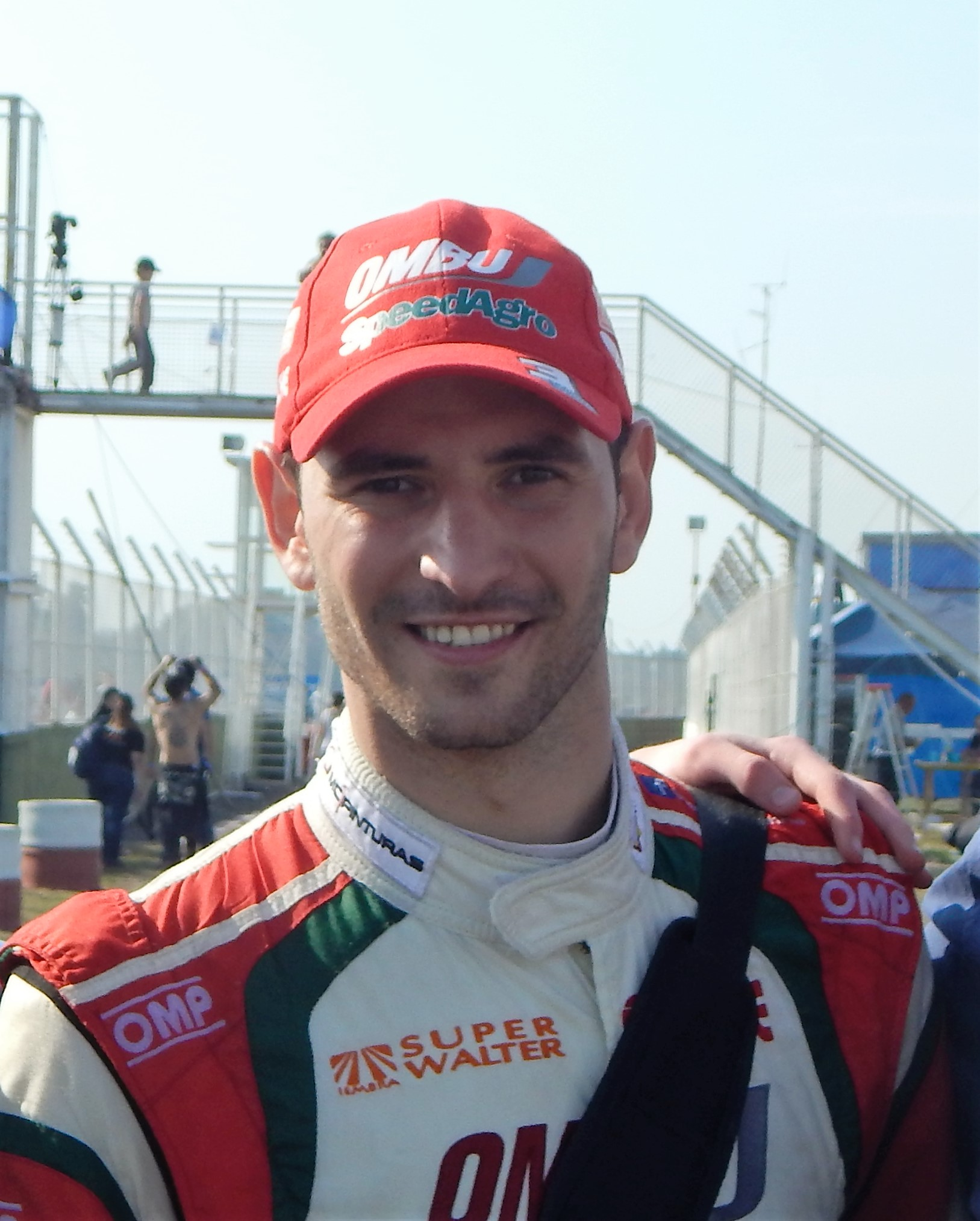 Ardusso Paraná 2015